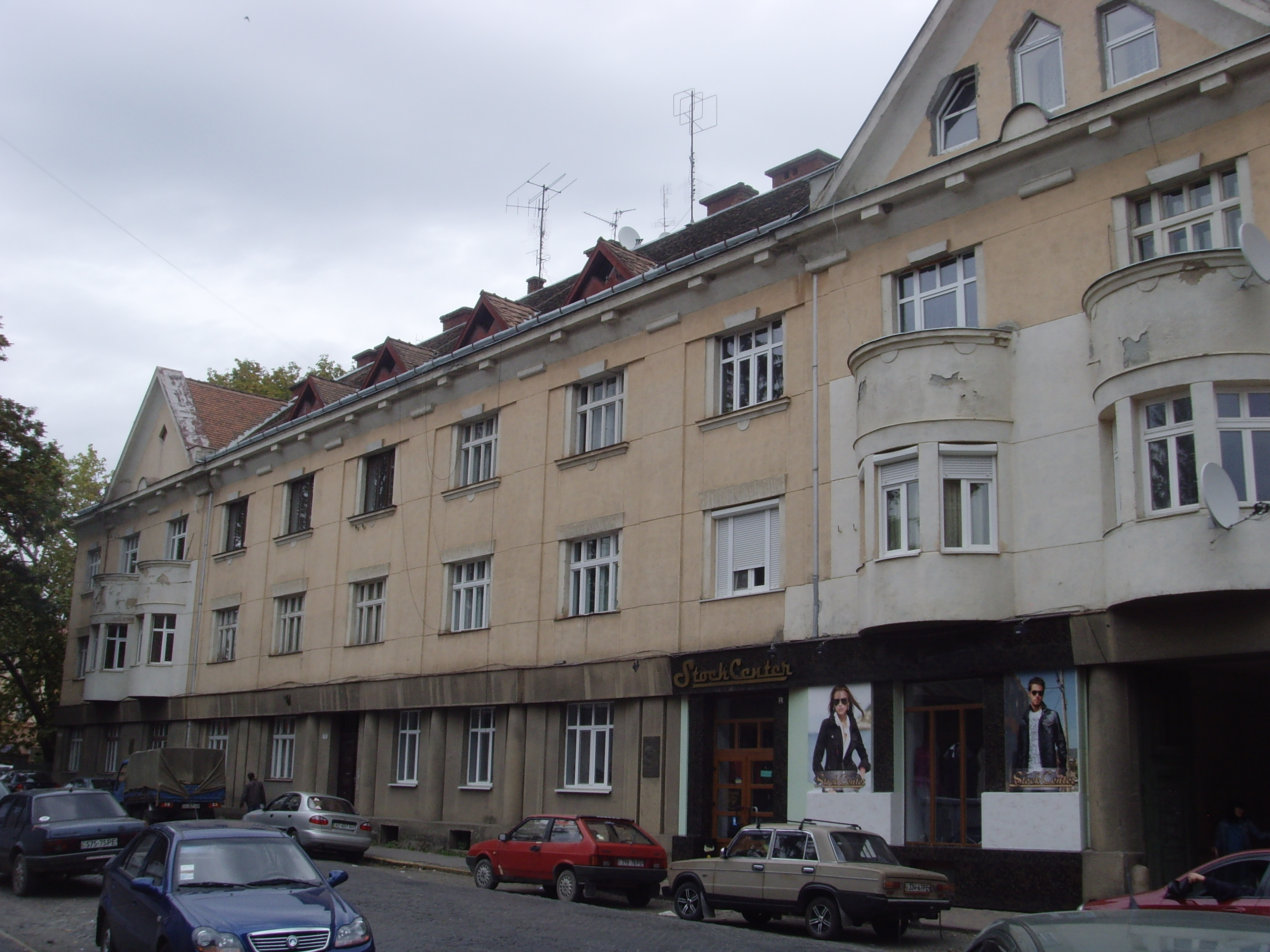 м. Ужгород, вул. П. Мирного, 4; координати 48.625296, 22.303696